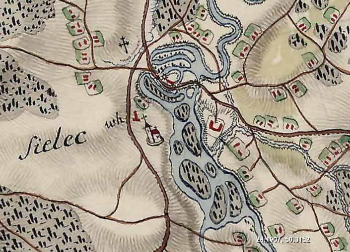 Tak mnogo ludiy a smusla tak malo